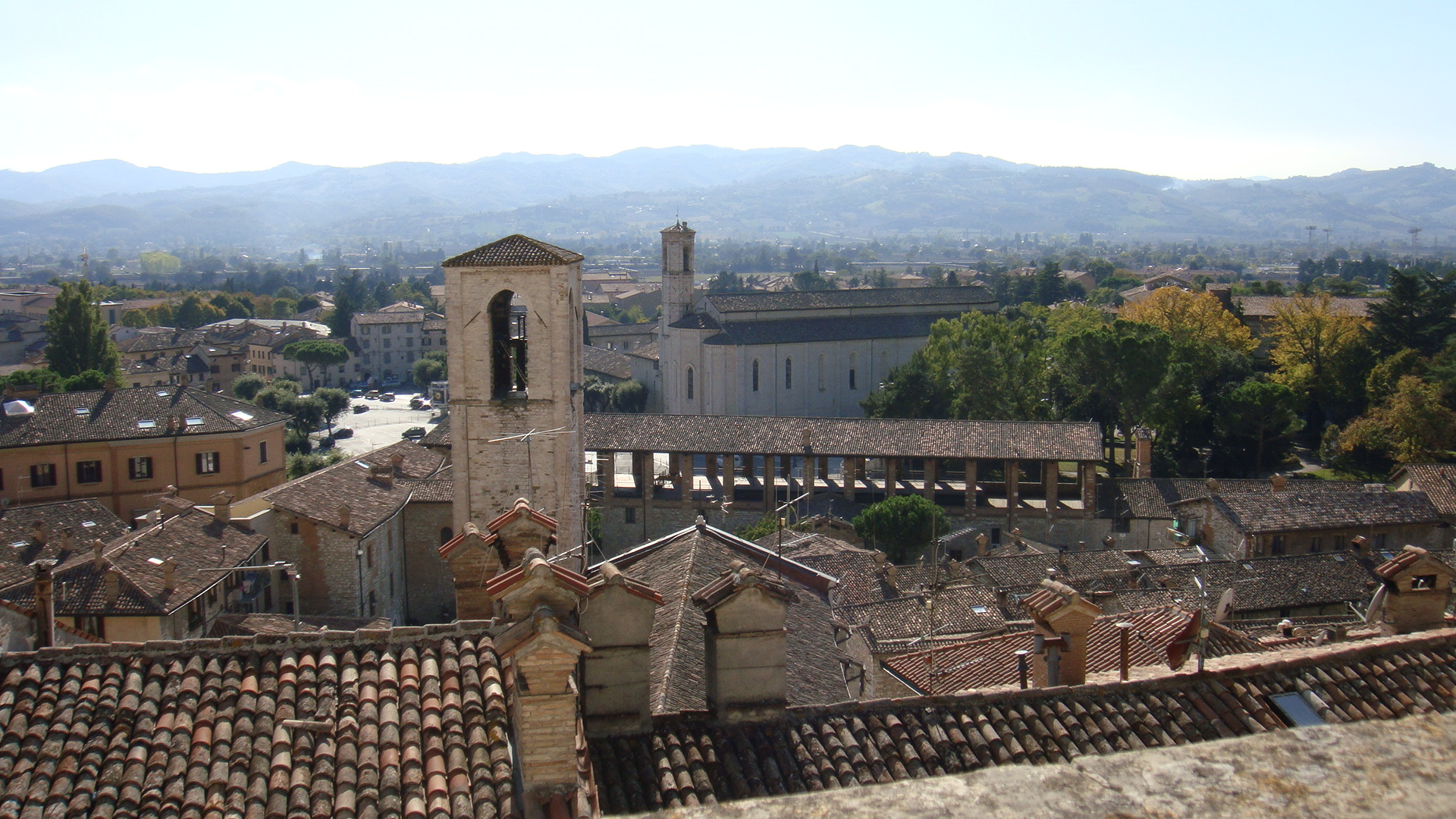 SCORCI DEL PAESE